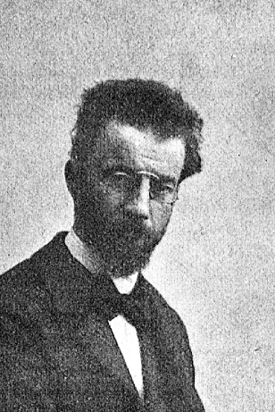 Gustav Alfred Thomann (1874–1961) Maler